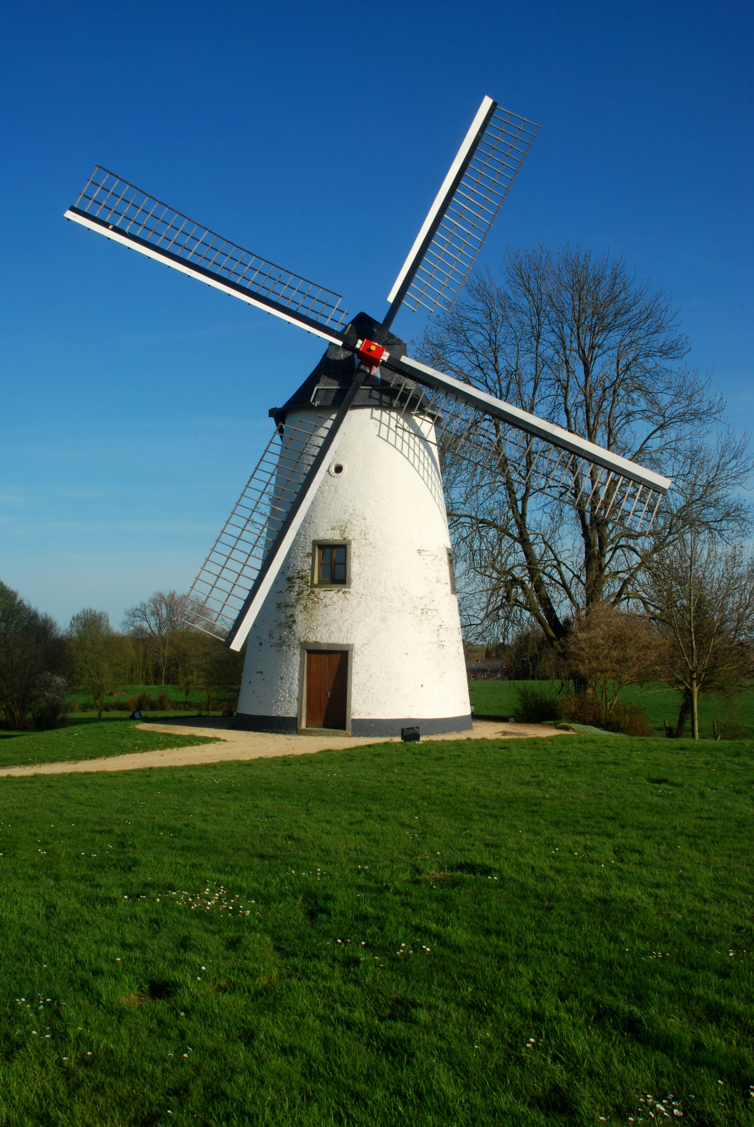 Belgique - Brabant wallon - Incourt - Opprebais - Moulin Gustot